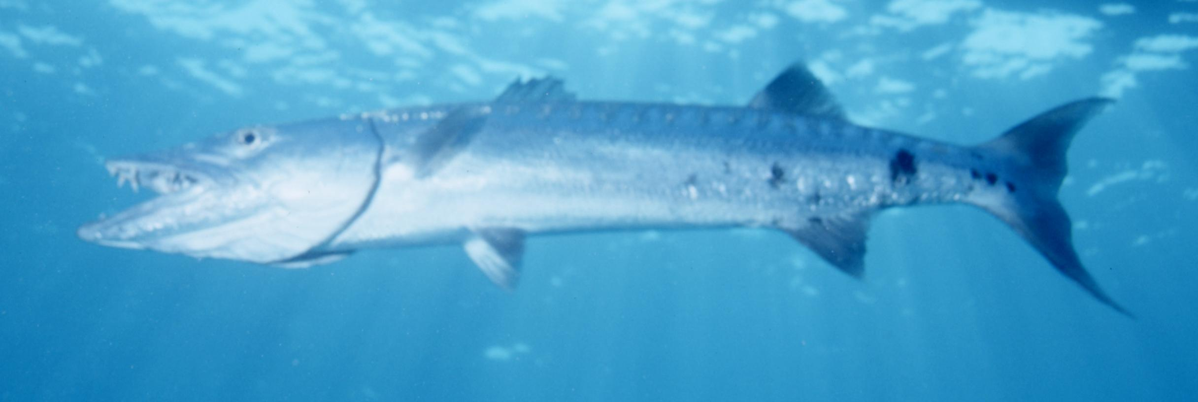 Sphyraena barracuda, Bahamas